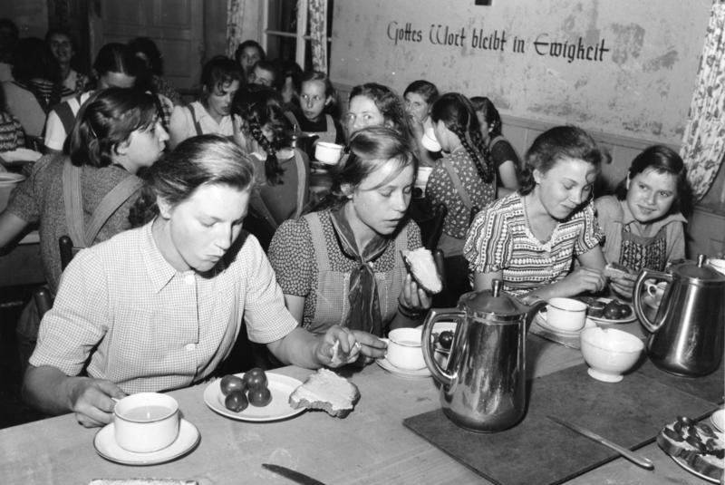 Jugendeinrichtungen für Kinder bei Freudenstadt